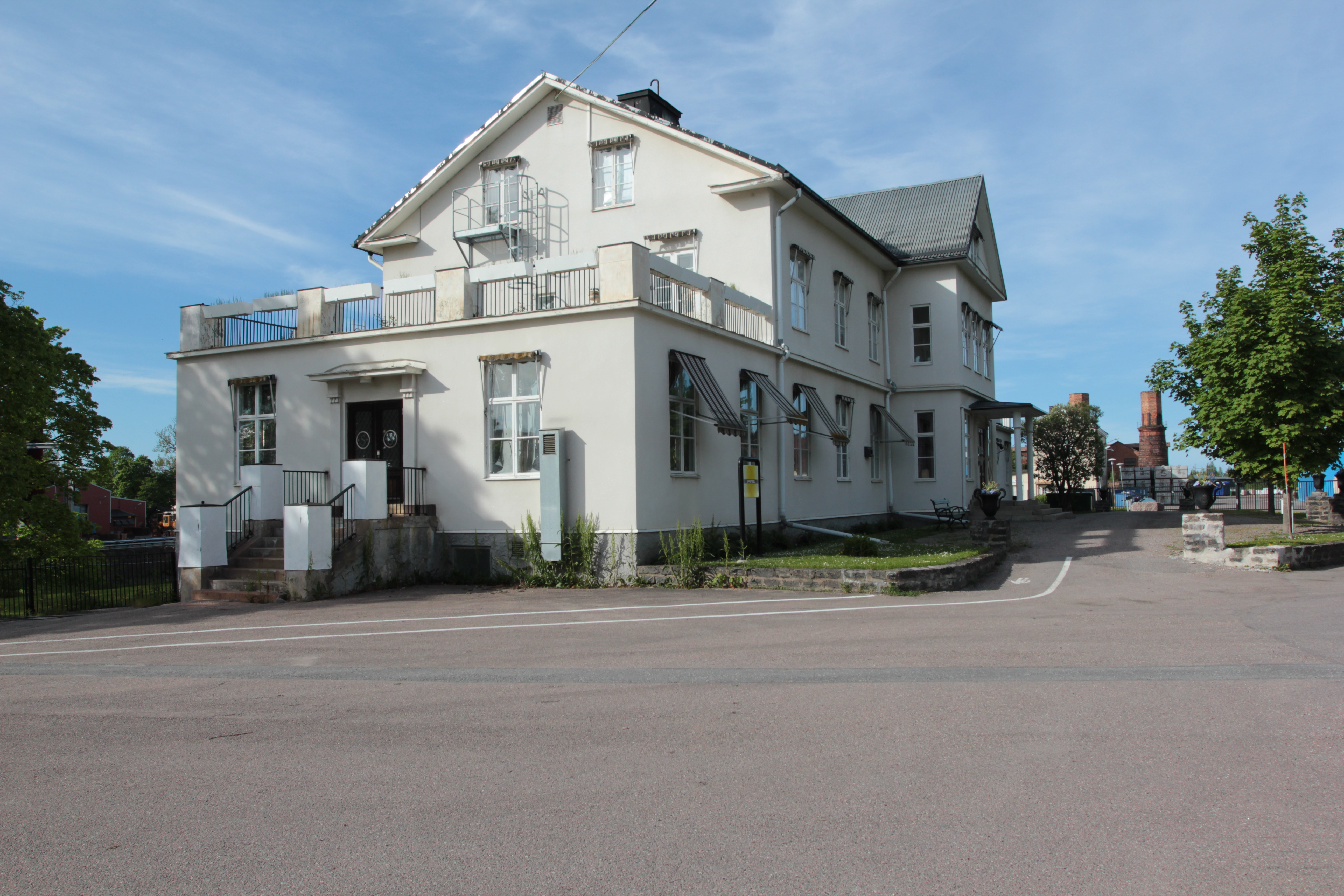 Söderfors bruk. Foto uppladdat som en del i Bergslagssafarin 26 maj 2012.